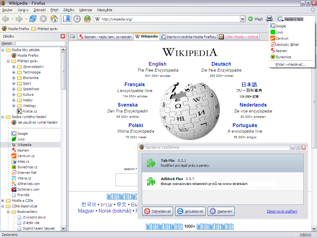 Obrázek okna české lokalizace Mozilla Firefox